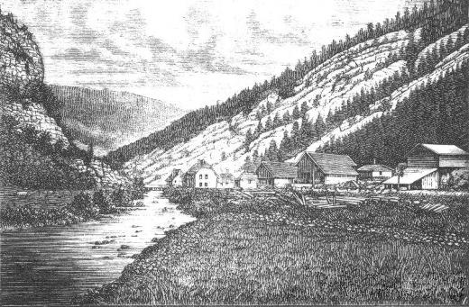 Sägerei an der Schüss bei Reuchenette, um 1867, im Hintergrund die Klus von Rondchâtel.